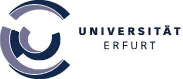 Aktuelles Logo der Universität Erfurt